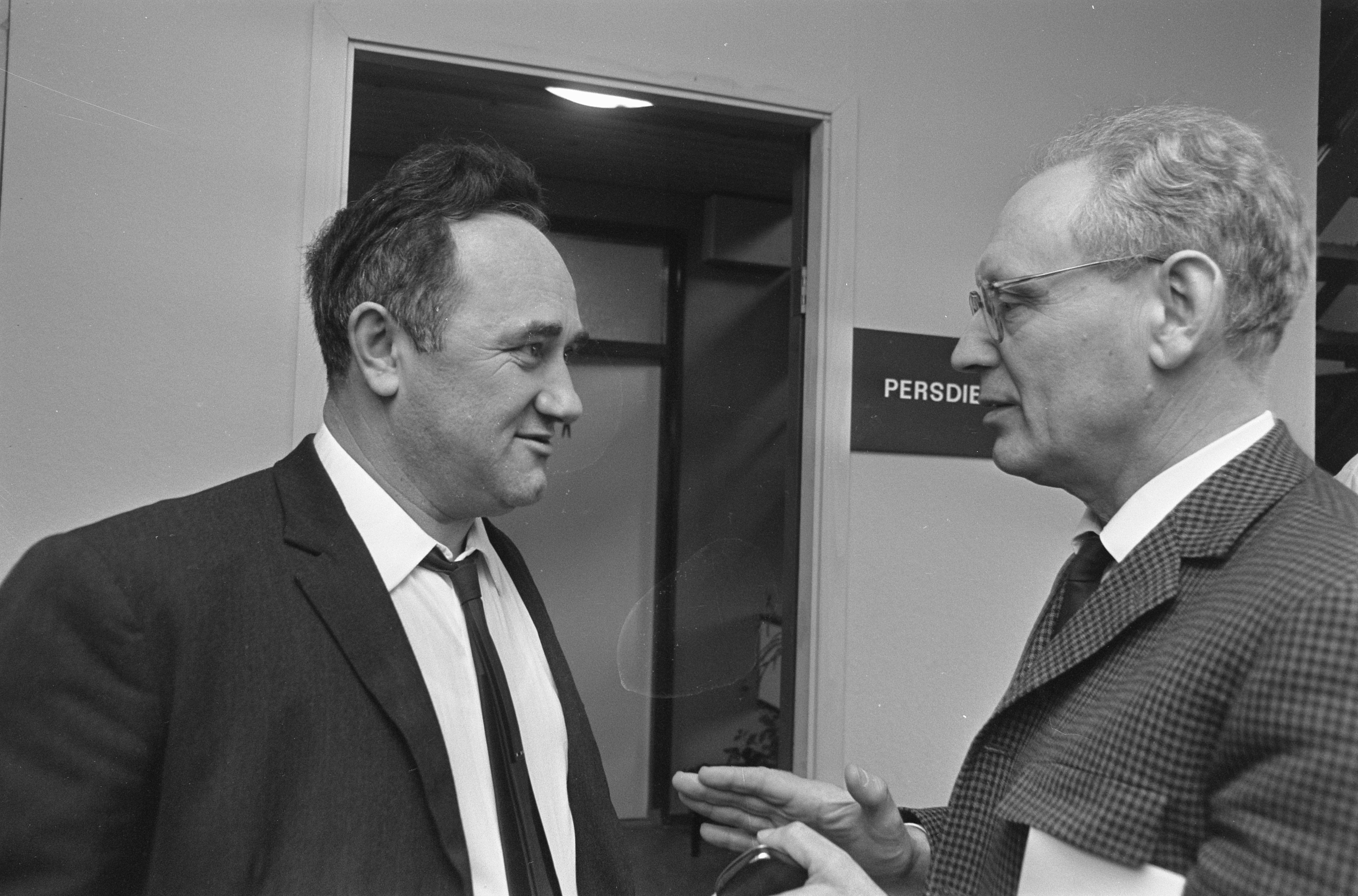 Collectie / Archief : Fotocollectie Anefo Reportage / Serie : [ onbekend ] Beschrijving : Hoogoven Schaaktoernooi nr. 15 : Geller (links) en Botwinnik Datum : 1 februari 1969 Trefwoorden : schaken, toernooien Fotograaf : Nijs, Jac. de / Anefo Auteursrechthebbende : Nationaal Archief Materiaalsoort : Negatief (zwart/wit) Nummer archiefinventaris : bekijk toegang 2.24.01.05 Bestanddeelnummer : 922-0654